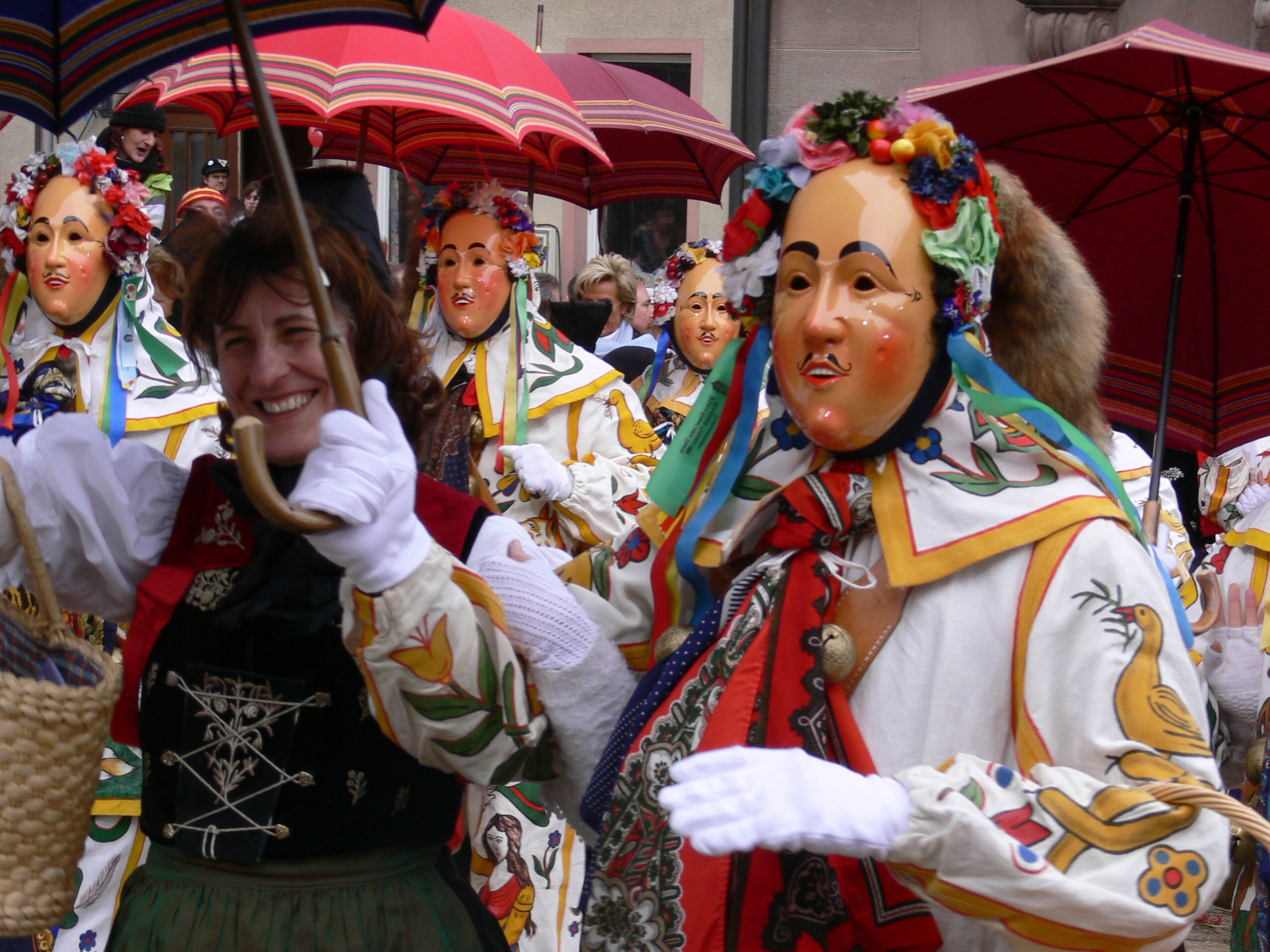 Frohsinn Donaueschingen, Figuren: Hansel und Gretle Veranstaltung: Narrensprung beim Narrentreffen Meßkirch 2006